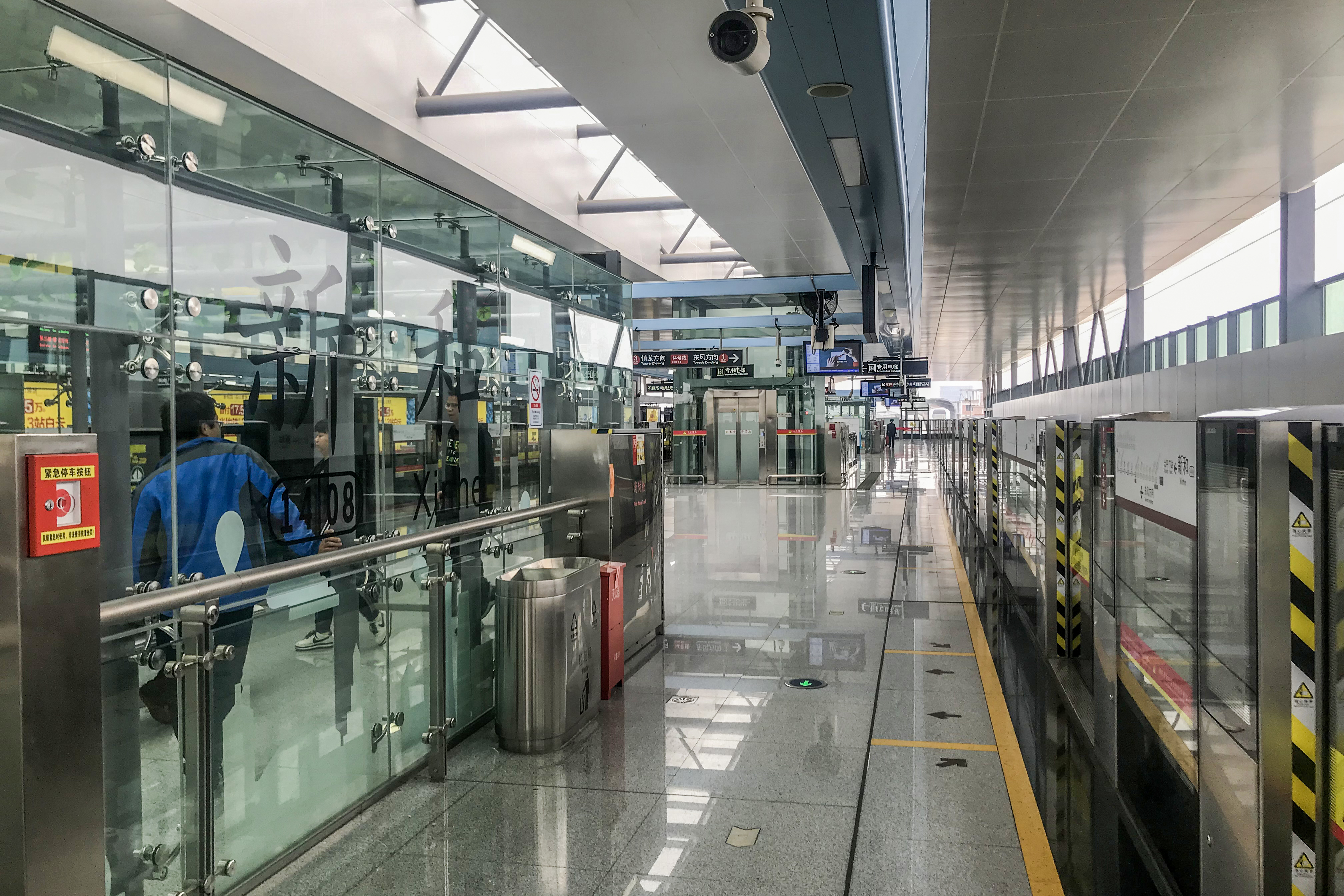 广州地铁新和站